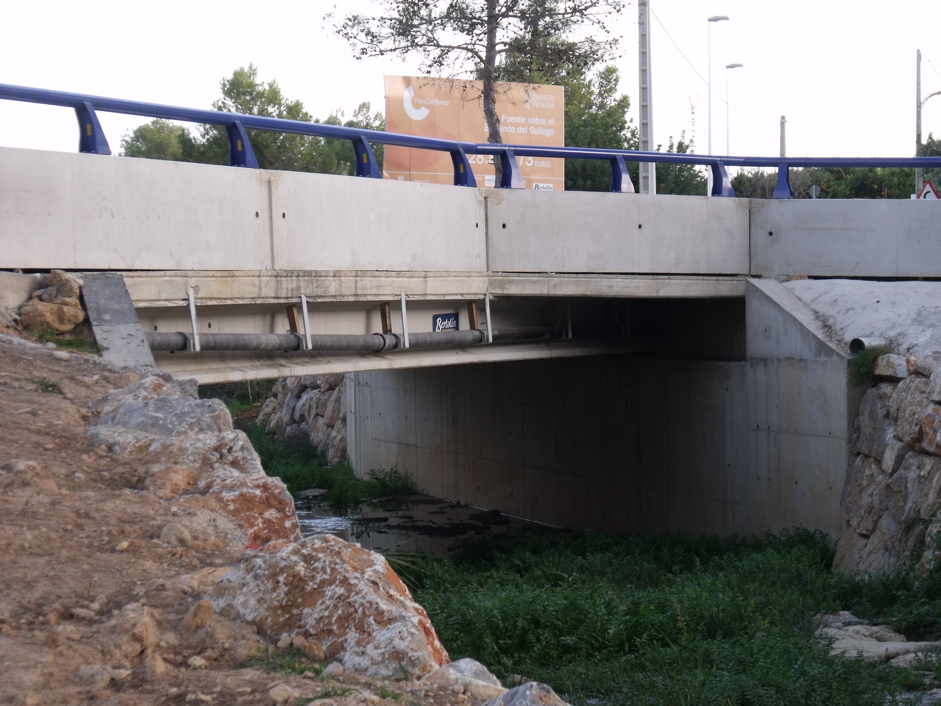 Puente sobre el Barranco del Gallego para dar acceso a la urbanización Sierra Perenchiza, en Chiva.